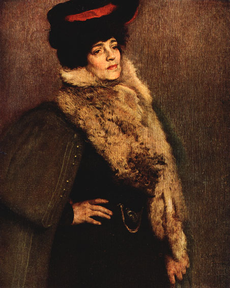 Obra do Projeto Eliseu Visconti